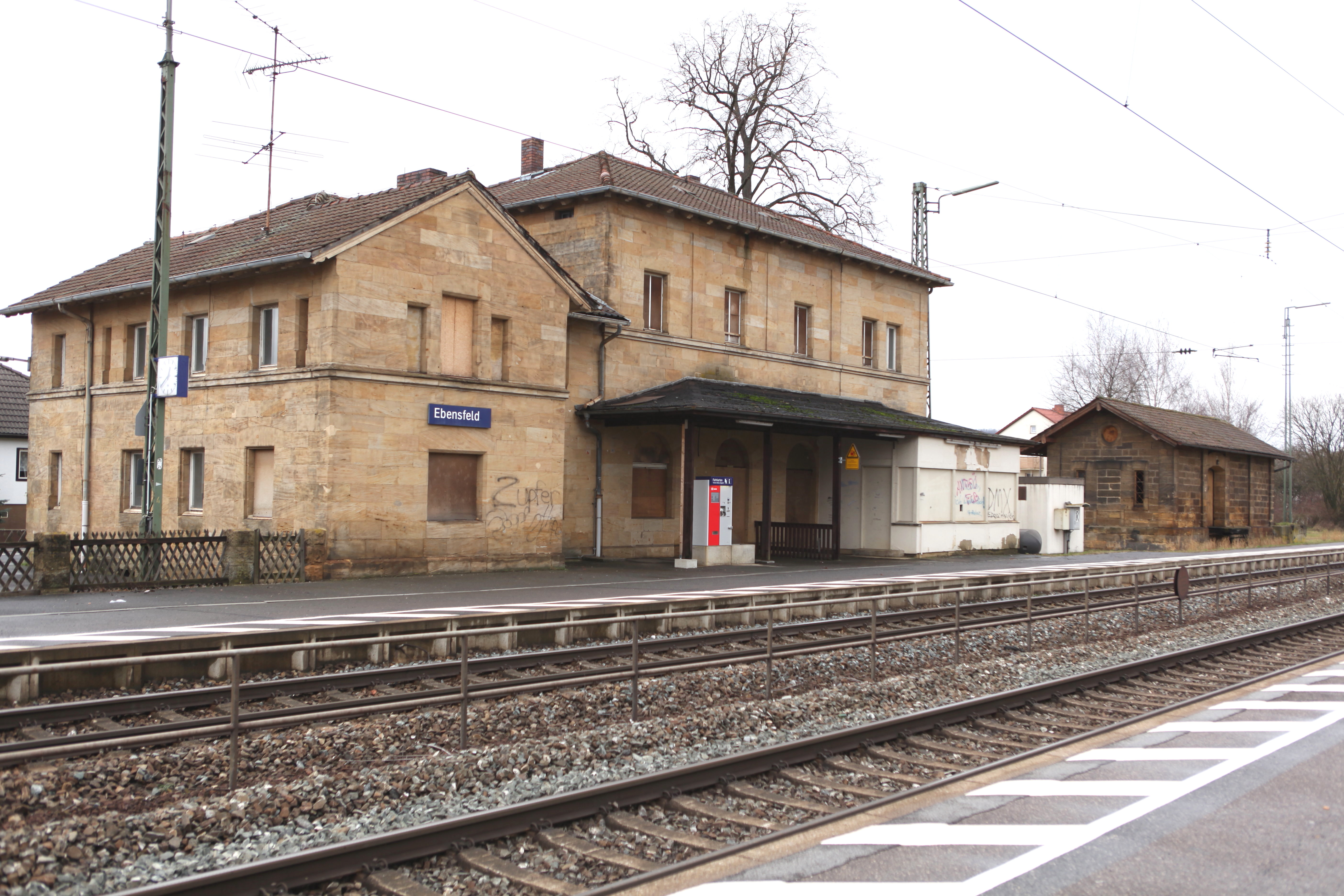 ehemaliger Bahnhof Ebensfeld